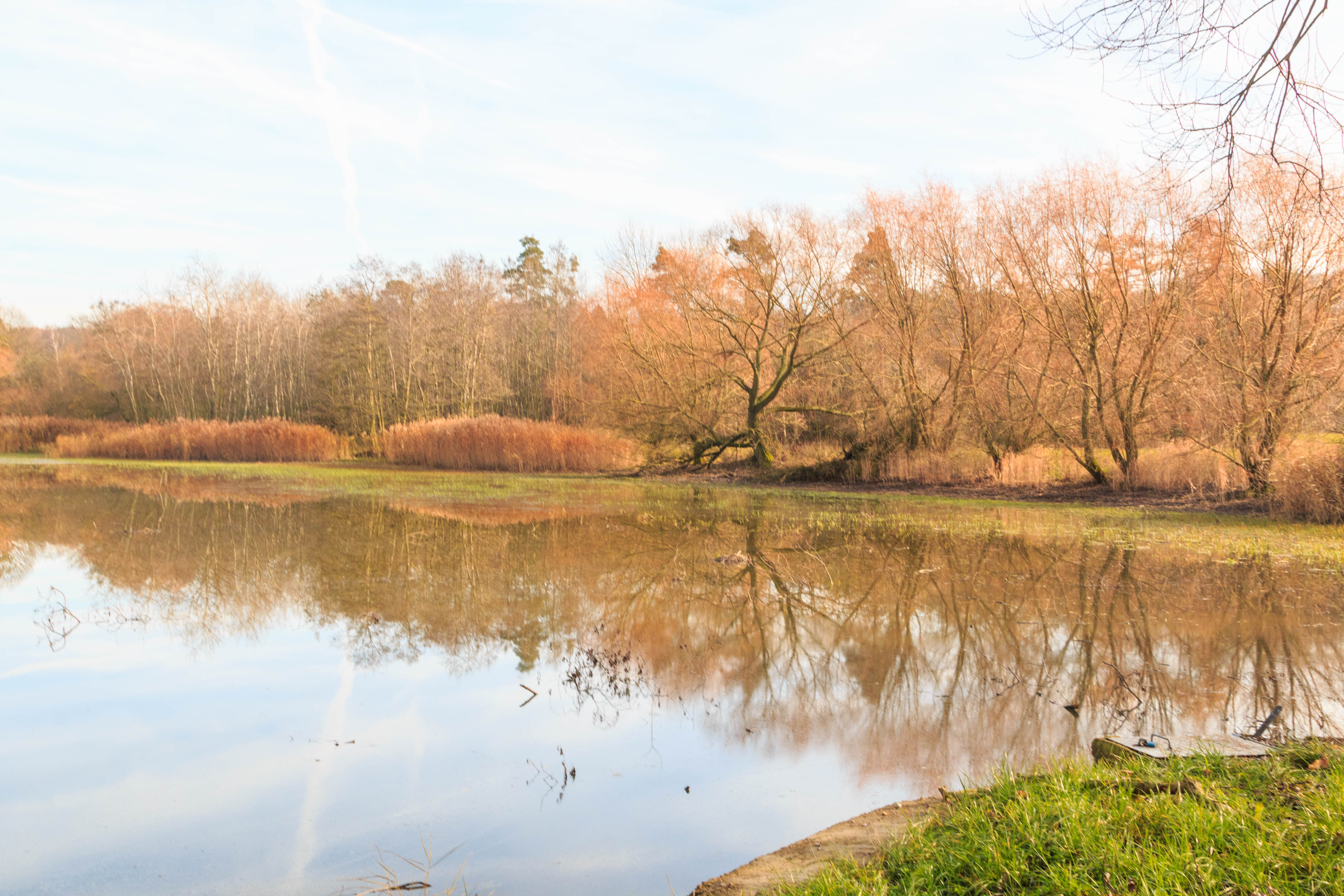 Rybník pod obcí Vápno Project: Vodstvo.